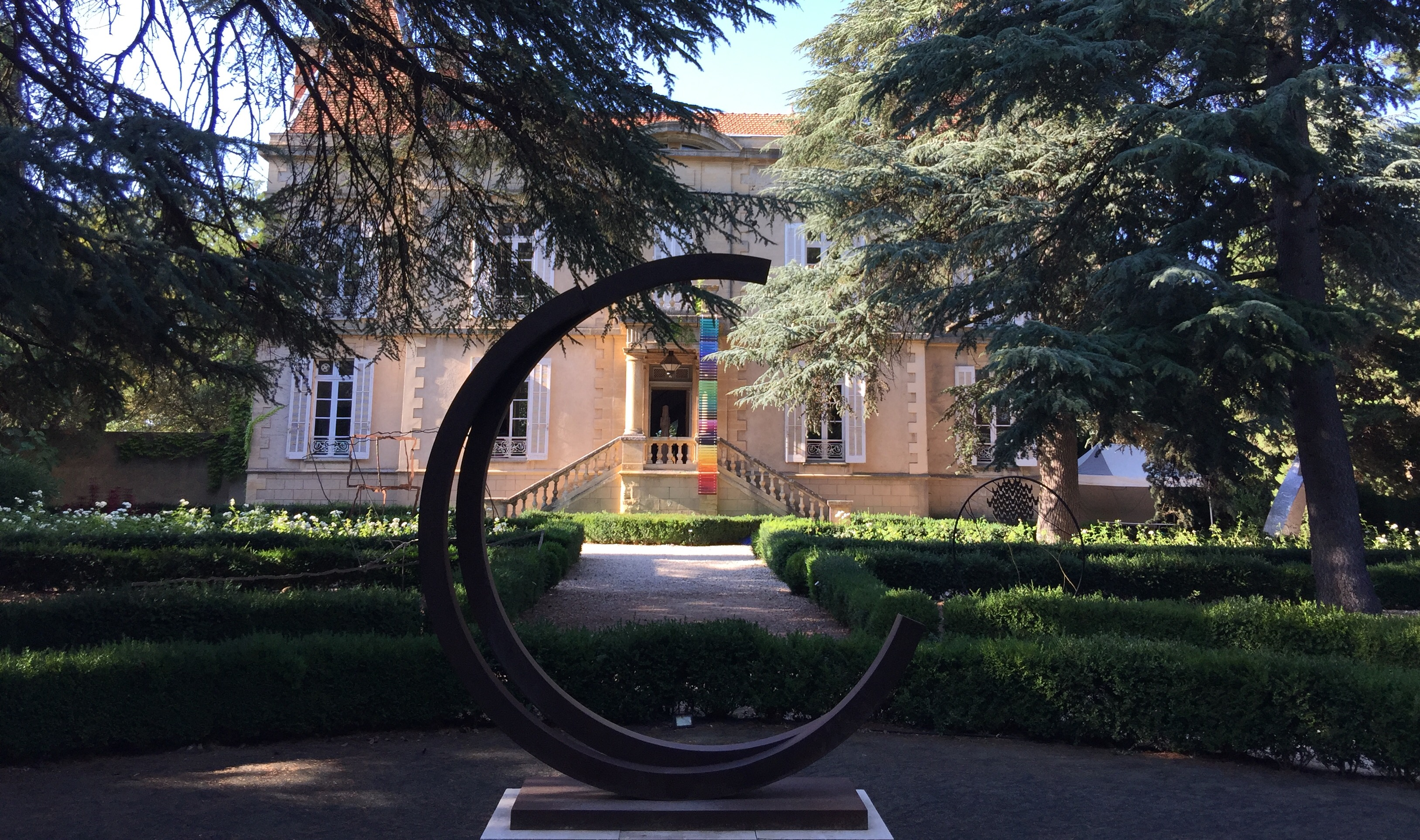 Château de Bosc, Domazan (30)